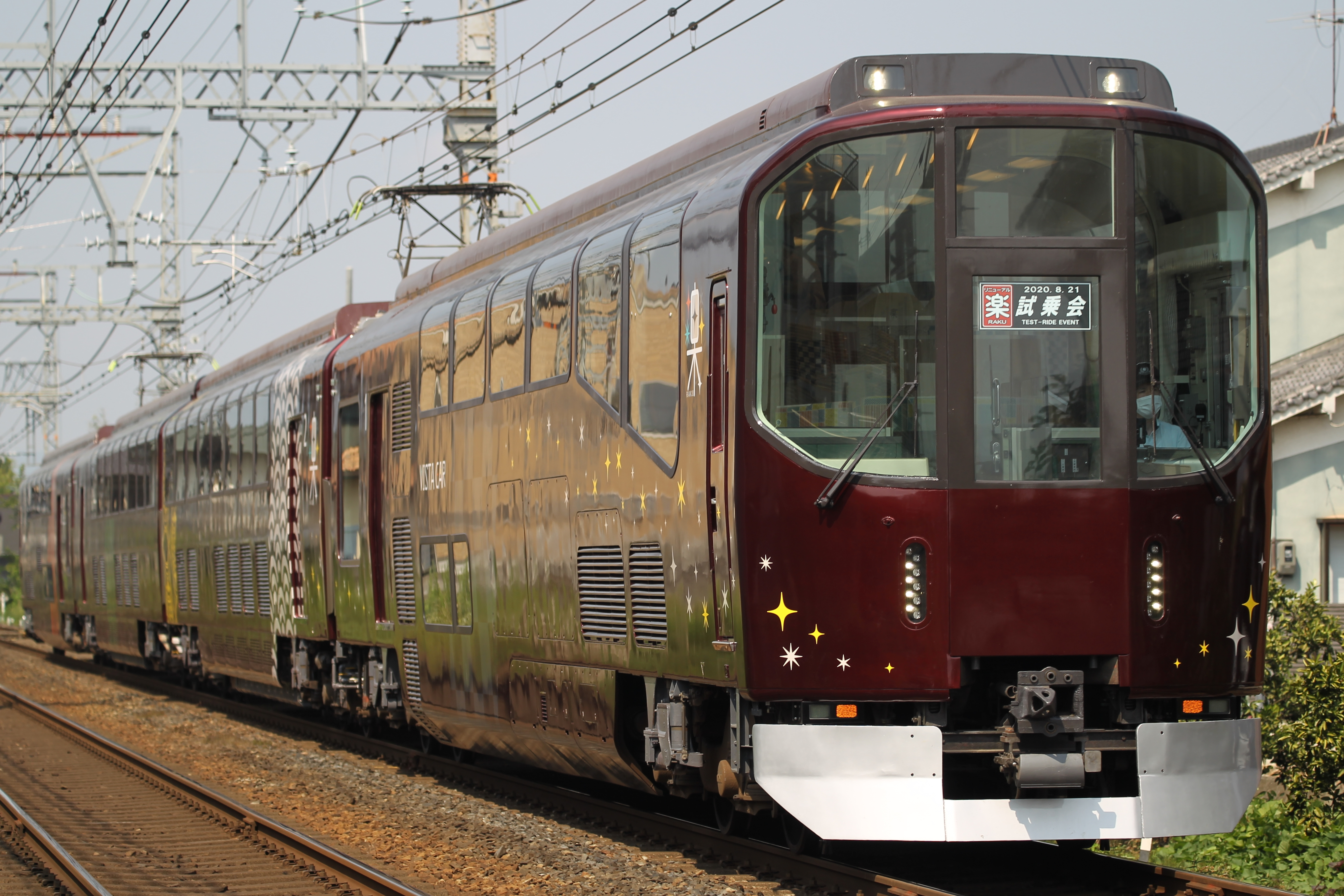 近鉄20000系PL01 「楽」 リニューアル 試乗会 耳成～大福 An email containing details of the permission for this file has been sent in accordance with Commons:OTRS. Note to uploaders: Please copy the URL of this file in the email to assist OTRS volunteers to find it. Do not send emails containing only the text "OTRS pending", as this is not of any use. Please make sure file includes a license at the time of the upload, this template is not a substitute for a license If an email cannot be found in the OTRS system, this file may be deleted for lack of valid licensing information. Note to OTRS volunteers: Please use OTRS received|id=XXXXXXXXXXXXXXX once the ticket has been identified, or if the email contains sufficient confirmation of the validity of the license, please replace this template with PermissionOTRS|id=XXXXXXXXXXXXXXX If the permission provided is not acceptable, nominate the file for deletion or delete it.